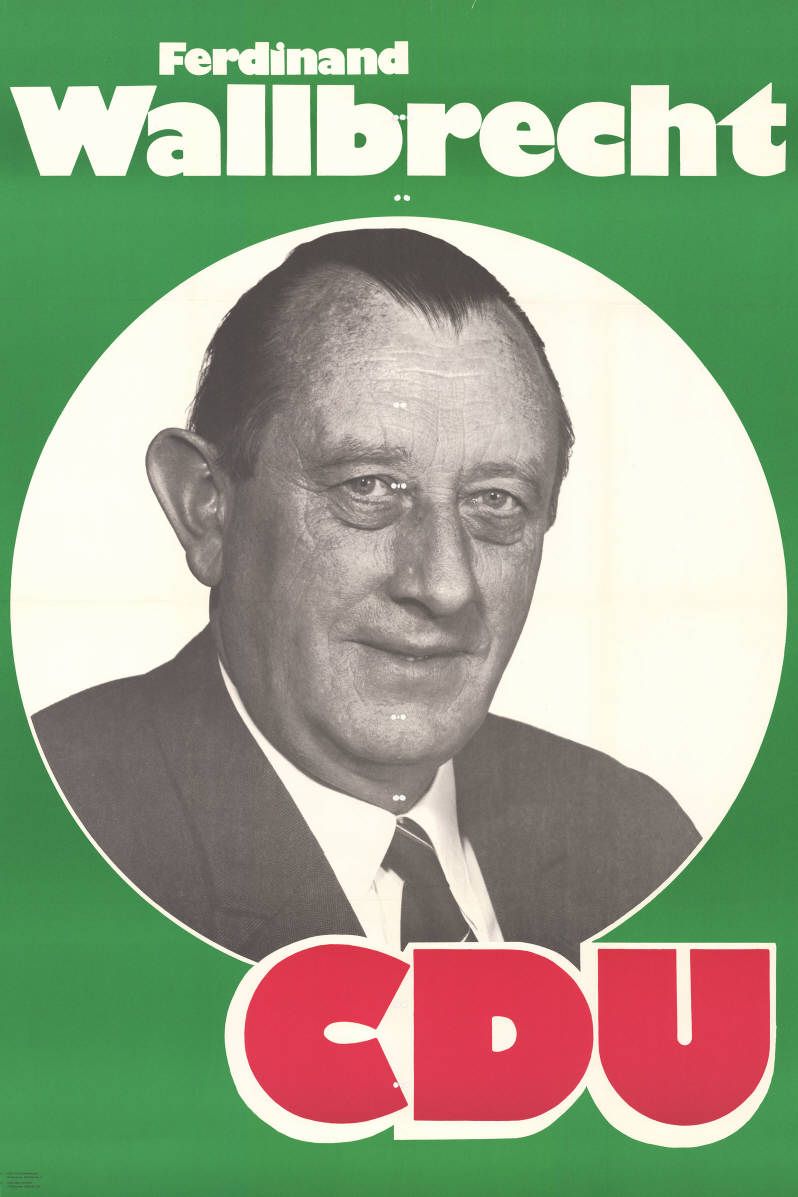 Ferdinand Wallbrecht CDUAbbildung:PorträtfotoPlakatart:Kandidaten-/Personenplakat mit PorträtAuftraggeber:CDU in Niedersachsen, HannoverDrucker_Druckart_Druckort:Gebrüder Jänecke, HannoverObjekt-Signatur:10-008 : 312Bestand:Landtagswahlplakate Niedersachsen (10-008)GliederungBestand10-18:Landtagswahlplakate Niedersachsen (10-008) » CDULizenz:KAS/ACDP 10-008 : 312 CC-BY-SA 3.0 DE